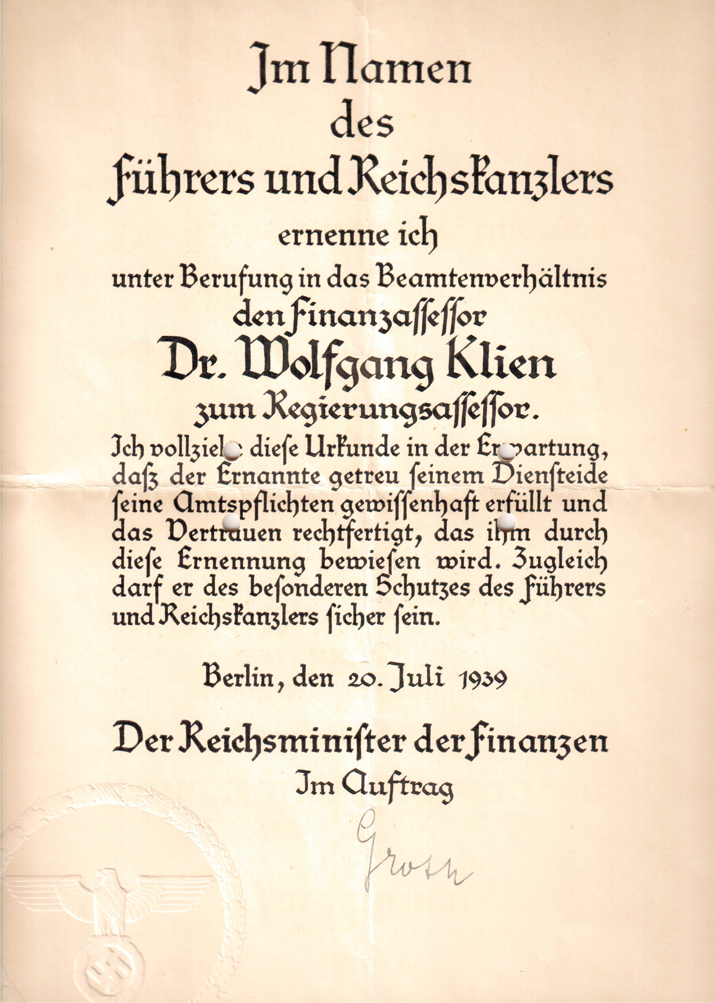 Ernennungsurkunde eines Regierungsassessors